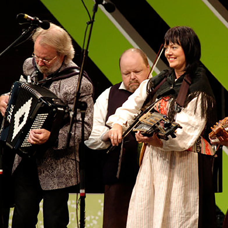 Åsa Jinder på Skansen med Benny Andersson och Kalle Moréus